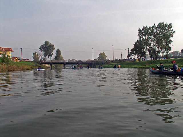 Vereknyei közúti híd (Pozsony)